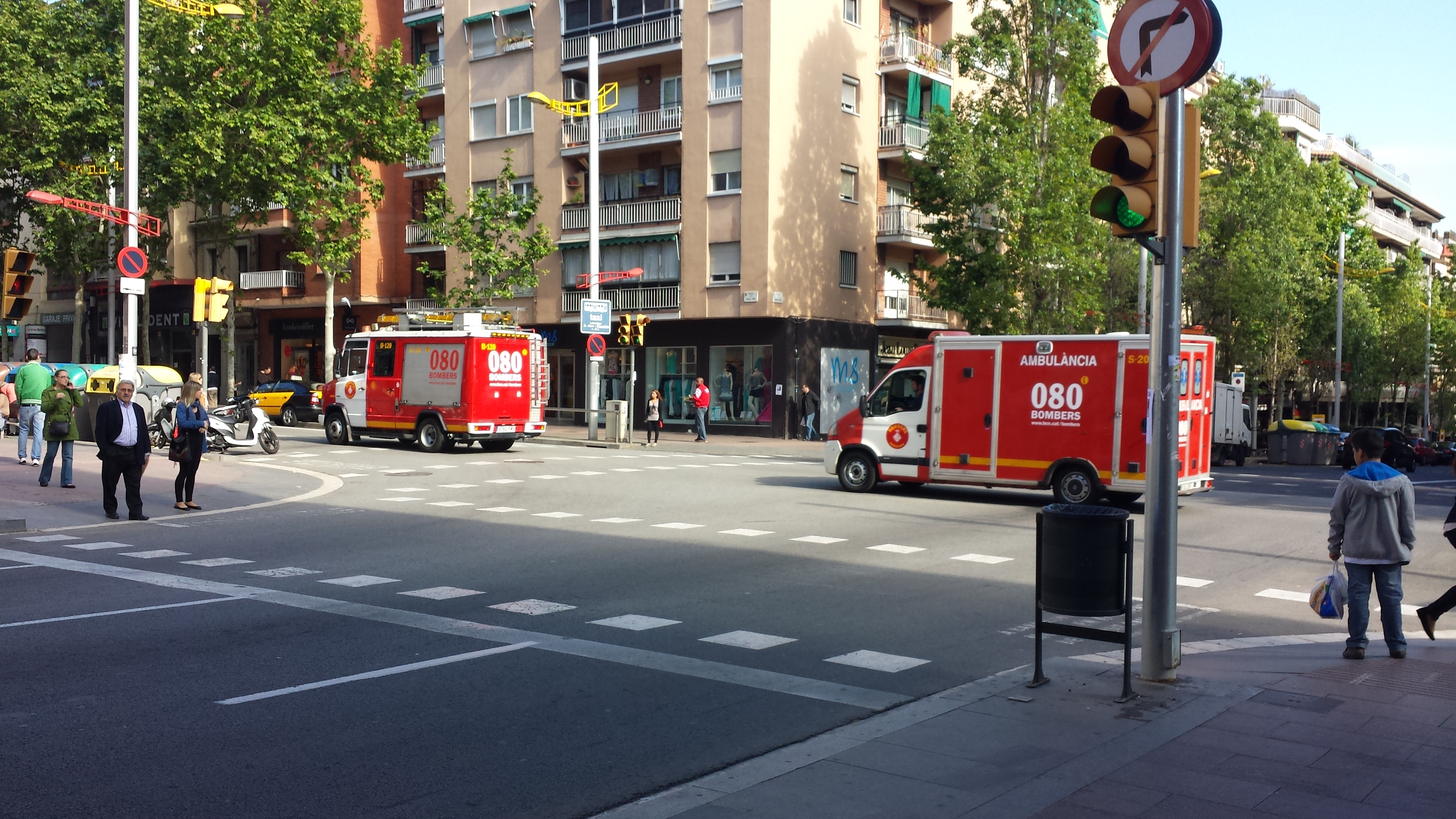 Bombers de Barcelona al Pg. Fabra i Puig de Barcelona.